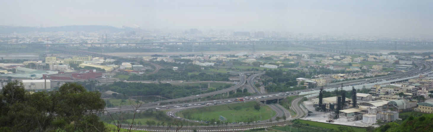 在王田斷崖鳥瞰陰天下的王田交流道，對岸即八卦山與彰化市。